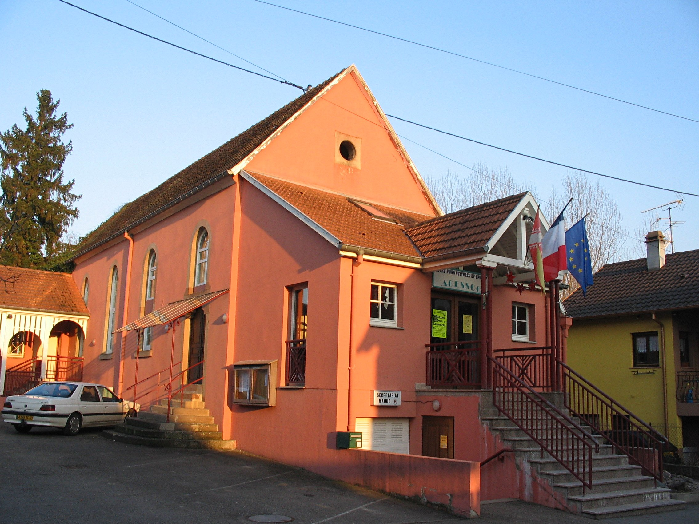 ancienne synagogue d'Odratzheim (Bas-Rhin) transformée en centre socio-culturel